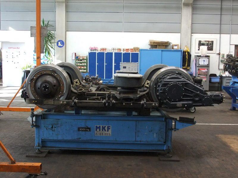 Ausgebautes Drehgestell eines Kurzgelenk-Niederflur-Triebwagens (Typ GT6N oder GT8N) der VAG Nürnberg beim Tag der offenen Tür 2011 im Betriebshof Heinrich-Alfes-Straße